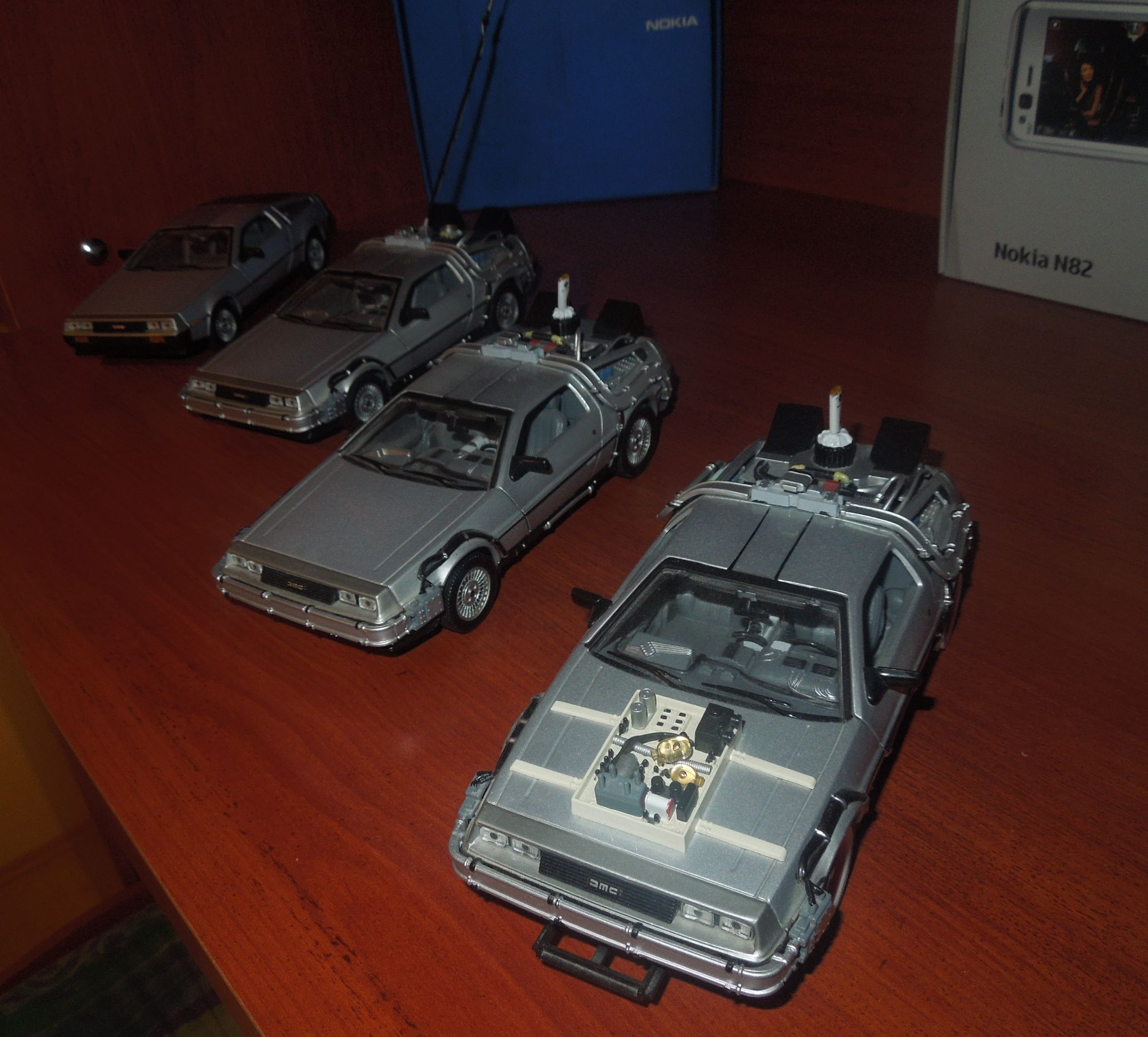 De Lorean DMC–12 modellautók Tibenszky Tibor gyűjteményéből